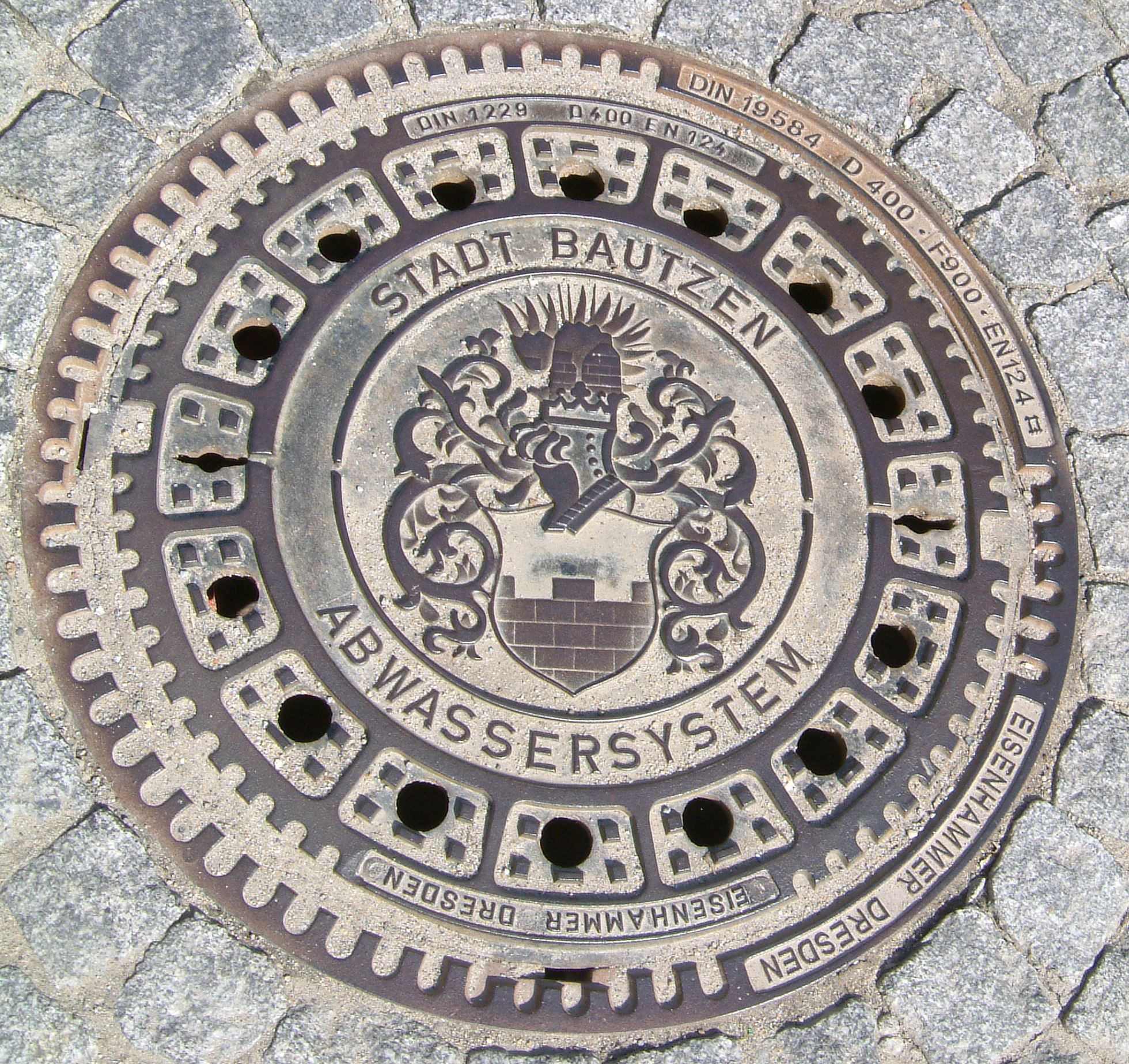 Kanaldeckel mit dem Wappen der Stadt Bautzen